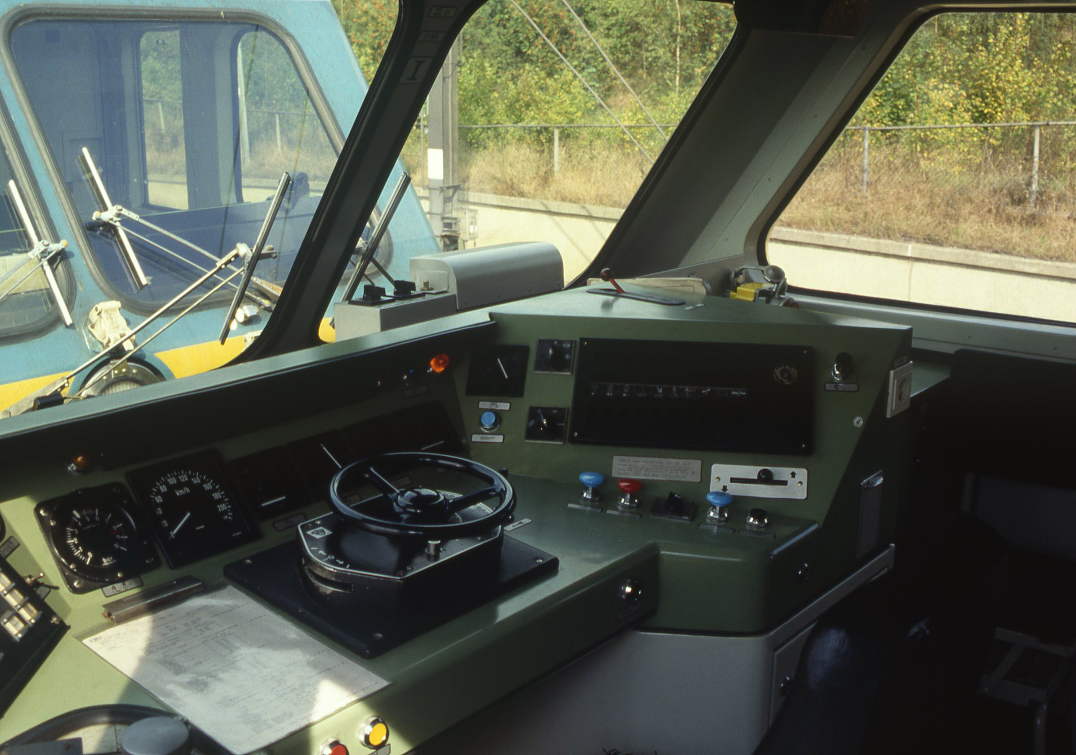 De locomotief 2160 is te bezichtigen. Hier de stuurpost